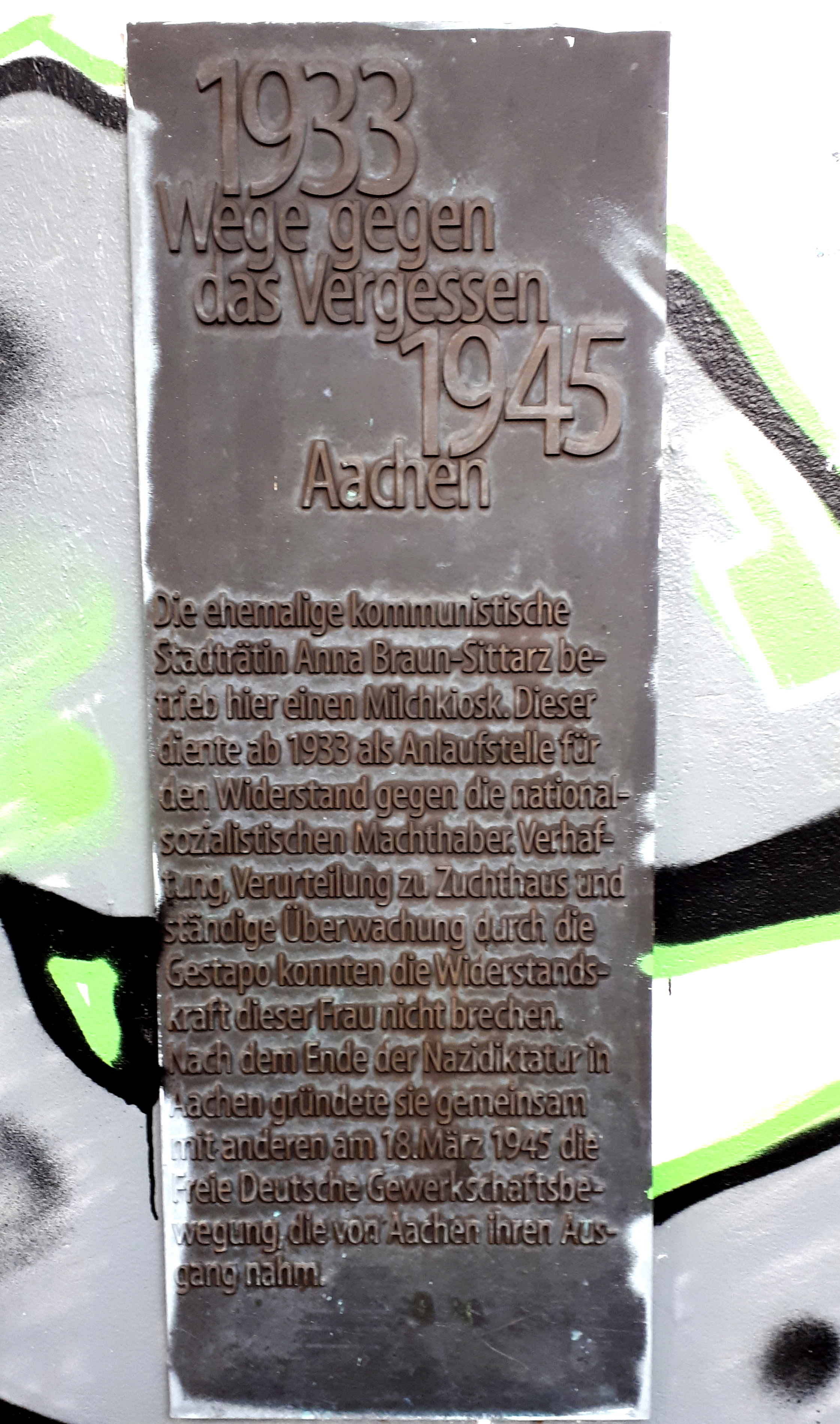 Gedenktafel im Rahmen "Wege gegen das Vergessen" am Anna-Sittarz-Platz in Aachen für Anna Braun-Sittarz